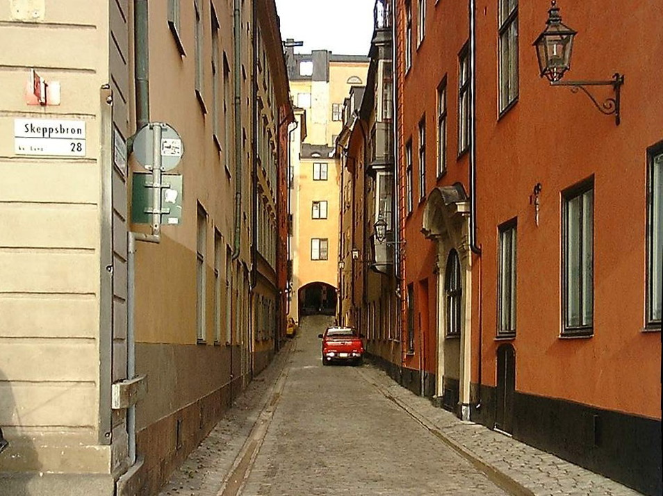 Ferkens Gränd viewed from Skeppsbron.